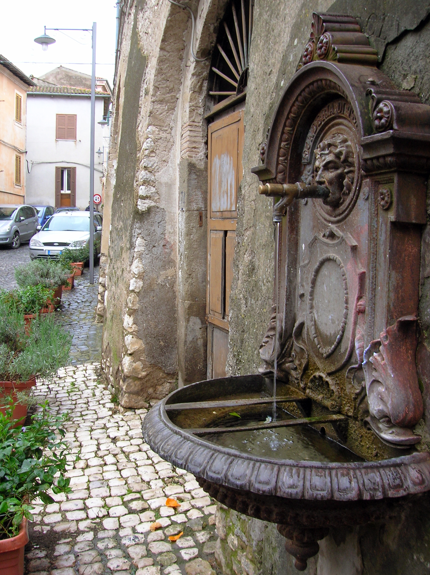 Fontana a Cori, Lazio, Italia.